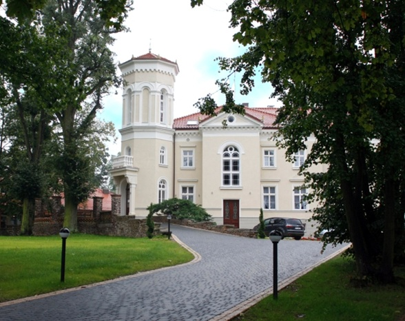 Pałac w Pawłowicach